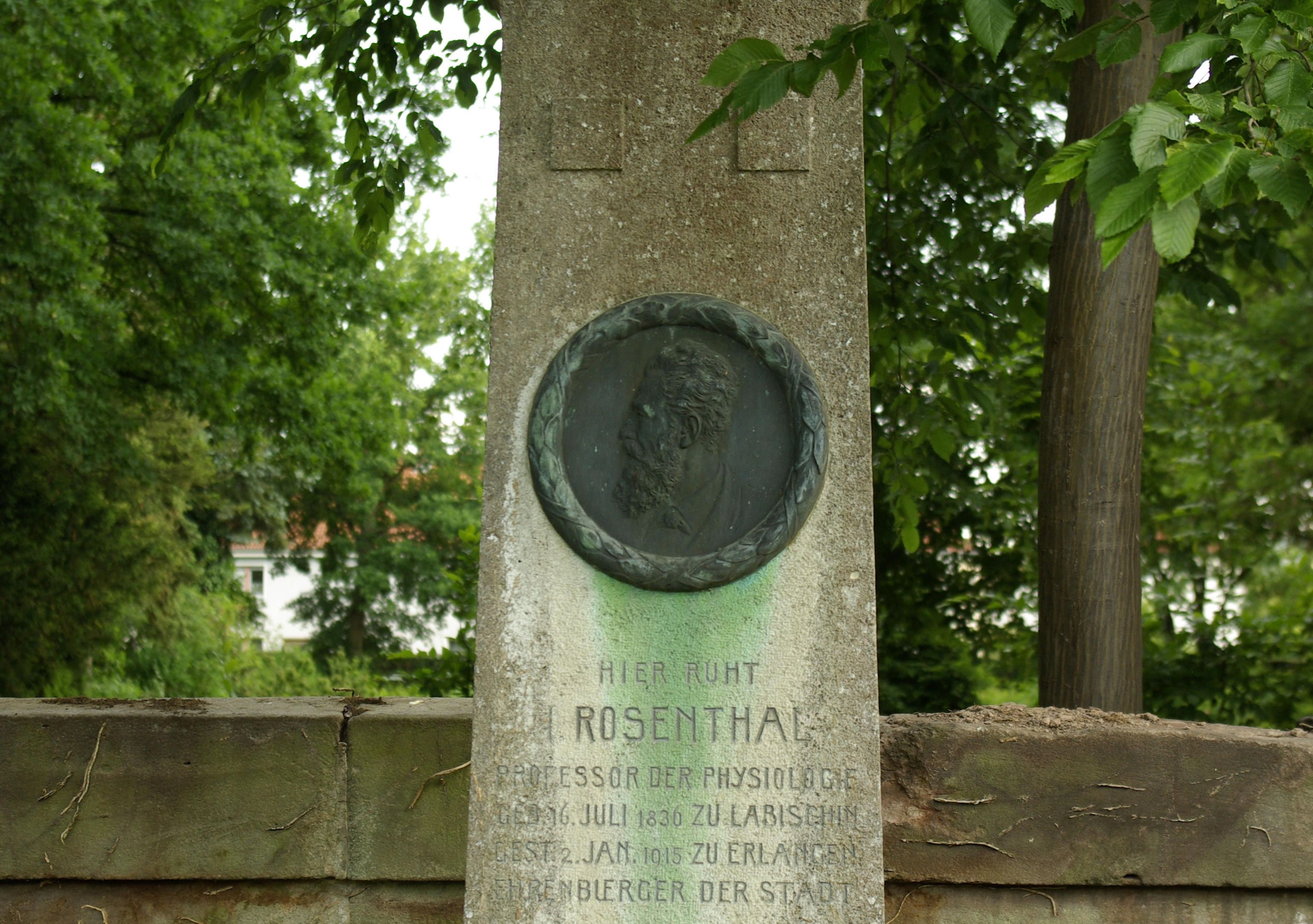 Zentralfriedhof in Erlangen: Feld 12, am Rand, Nr. 8. Isidor Rosenthal (Professor der Physiologie, Initiator des Erlanger Gemeinnützigen Vereins und Ehrenbürger der Stadt) und seine Frau Anna Rosenthal (Vorsitzende des Frauenvereins vom Roten Kreuz), Ehrengrab, antikisierende Stele mit Voluten- und Muschelbekrönung, Kunststein, bronzenes Medaillonbildnis, um 1915.